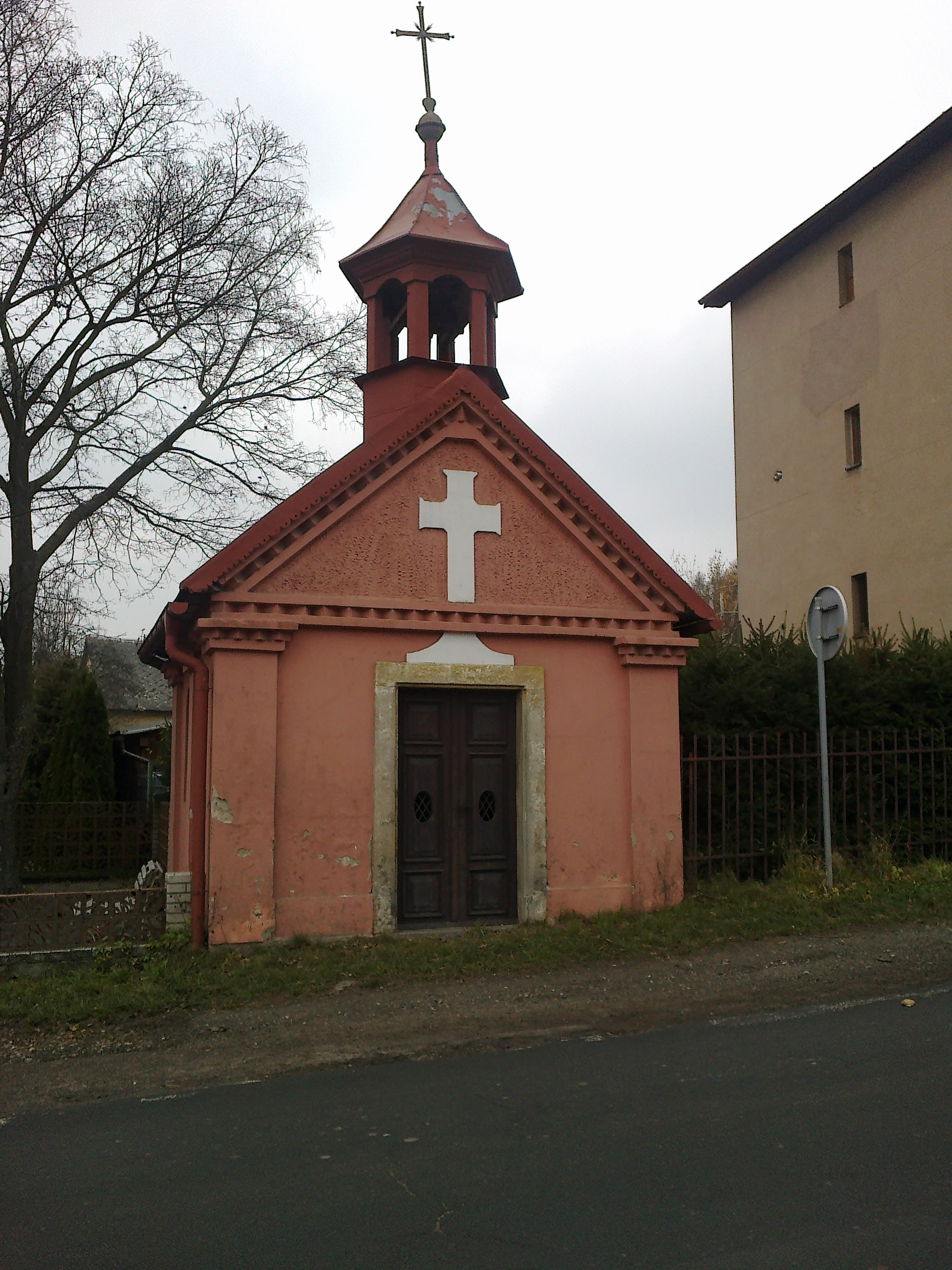 Kocbeře - červená kaplička